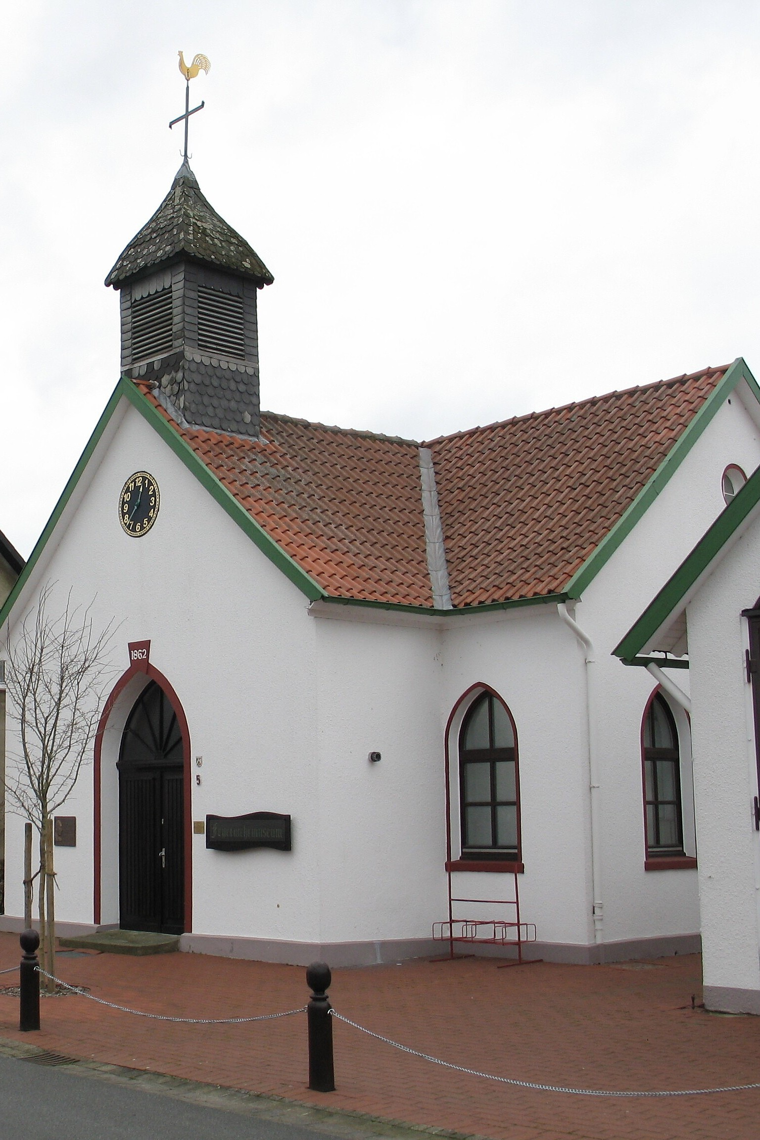 Dorfschule Schröttinghausen (Stadt Preußisch Oldendorf, Nordrhein-Westfalen) von 1862, jetzt Feuerwehrmuseum mit Gedenktafel für den bedeutenden Astronomen Walter Baade (1893-1960) am Gebäude seiner ersten Schuljahre. Baade ist auch einer der einflussreichsten Astrophysiker des 20. Jahrhunderts. Das seit dem Jahre 2000 betriebene Magellan Teleskop in Chile erhielt zu seinen Ehren den Namen Walter Baade Telescope. Village school of Schröttinghausen (town of Preußisch Oldendorf, Germany), now museum of the village fire brigade. At the building of his first school years a memorial plaque for the prominent astronomer Walter Baade (1893-1960) is attached. Baade is also one of the most influential 20th century astrophysicists. One of the Magellan Telescopes in Chile - being operated since the year 2000 - was named after him Walter Baade Telescope.